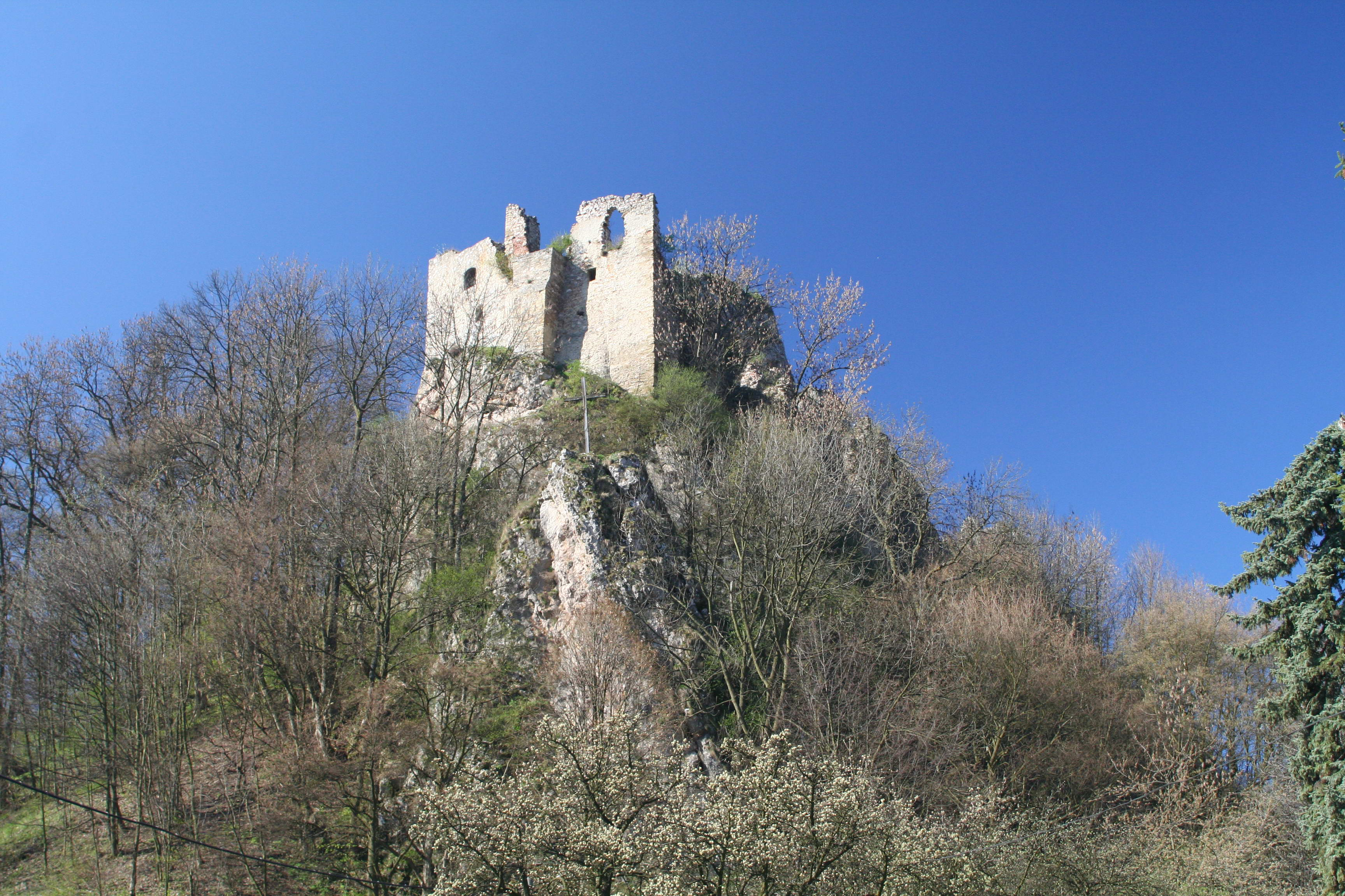 Lednica Hrad